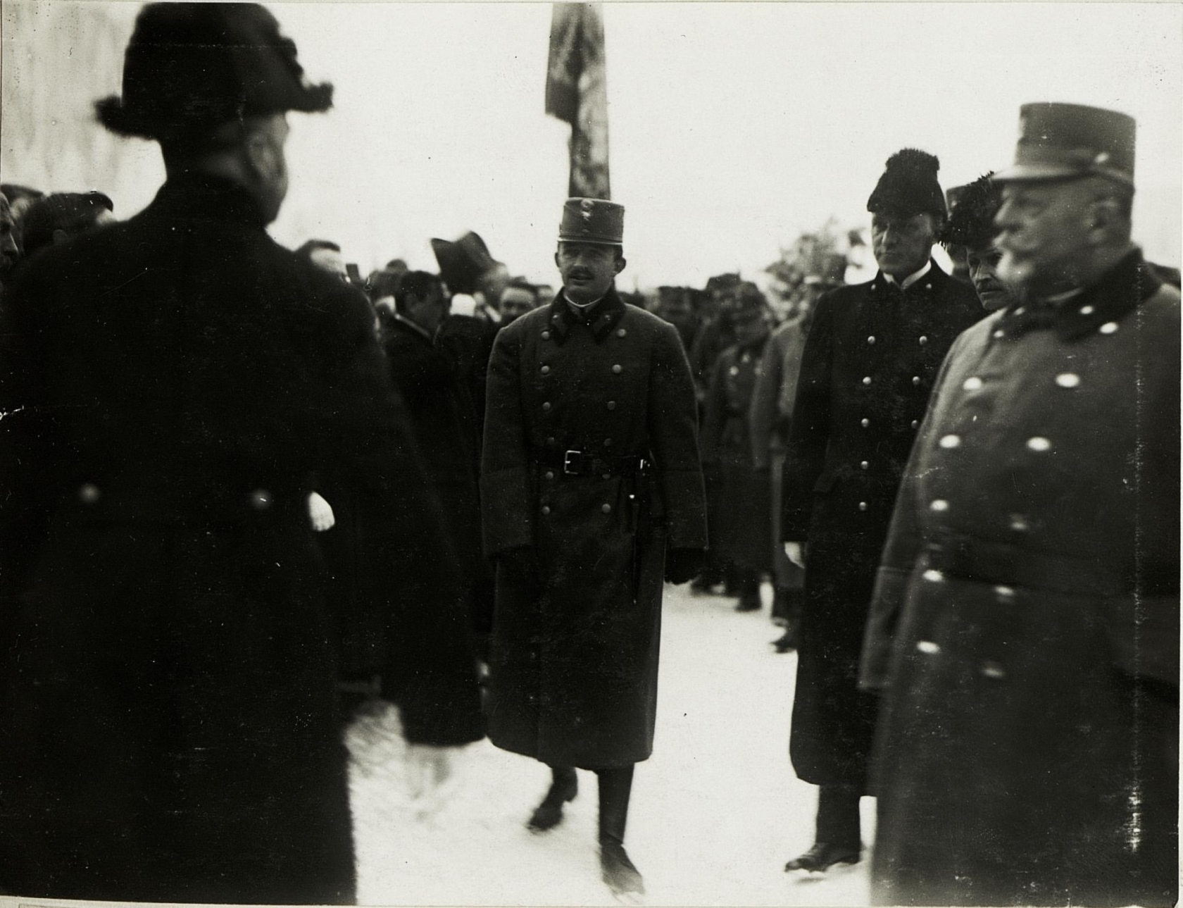 Kaiser Karl I., .Besuch in Trient:: Empfang durch die Zivilbevölkerung. Im Vordergrund rechts: FML Zdenko Prinz zu Lobkowitz